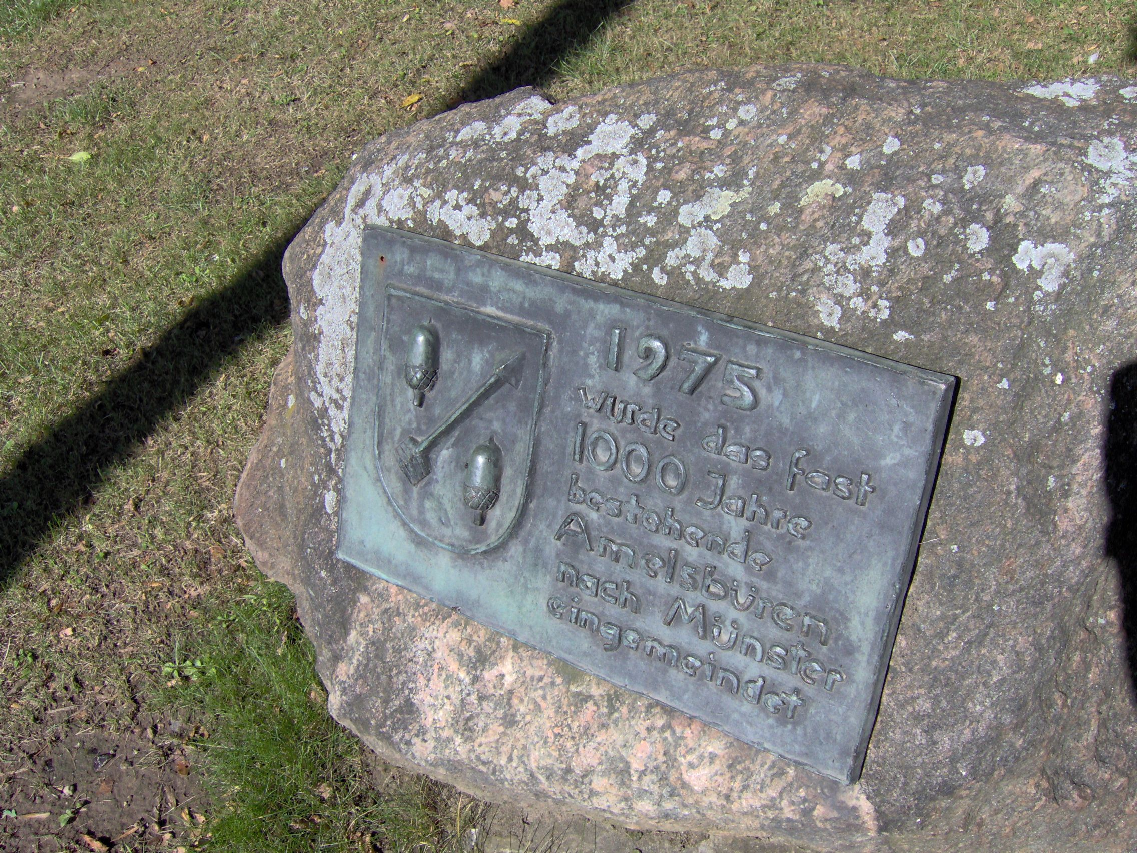 Erinnerungstafel an die Eingemeindung Amelsbürens